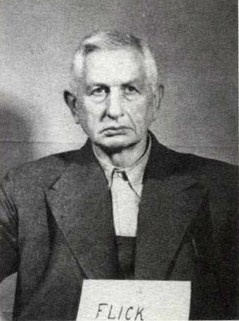 Friedrich Flick (* 10. Juli 1883 in Ernsdorf (Siegerland); † 20. Juli 1972 in Konstanz) war ein deutscher Unternehmer. Er war der Hauptangeklagter im Nürnberger Flick-Prozess.